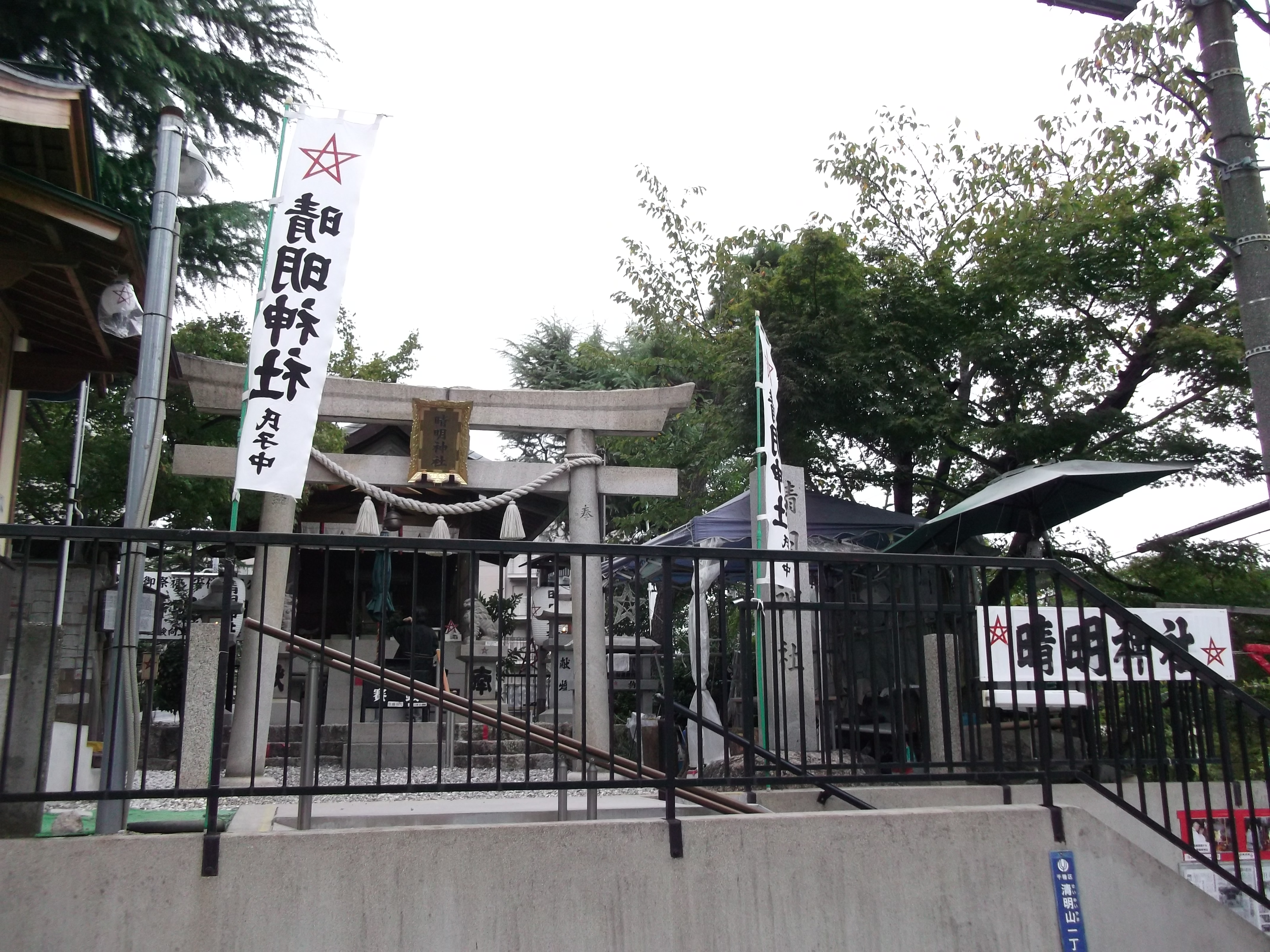 名古屋市千種区清明山に鎮座する名古屋晴明神社全景